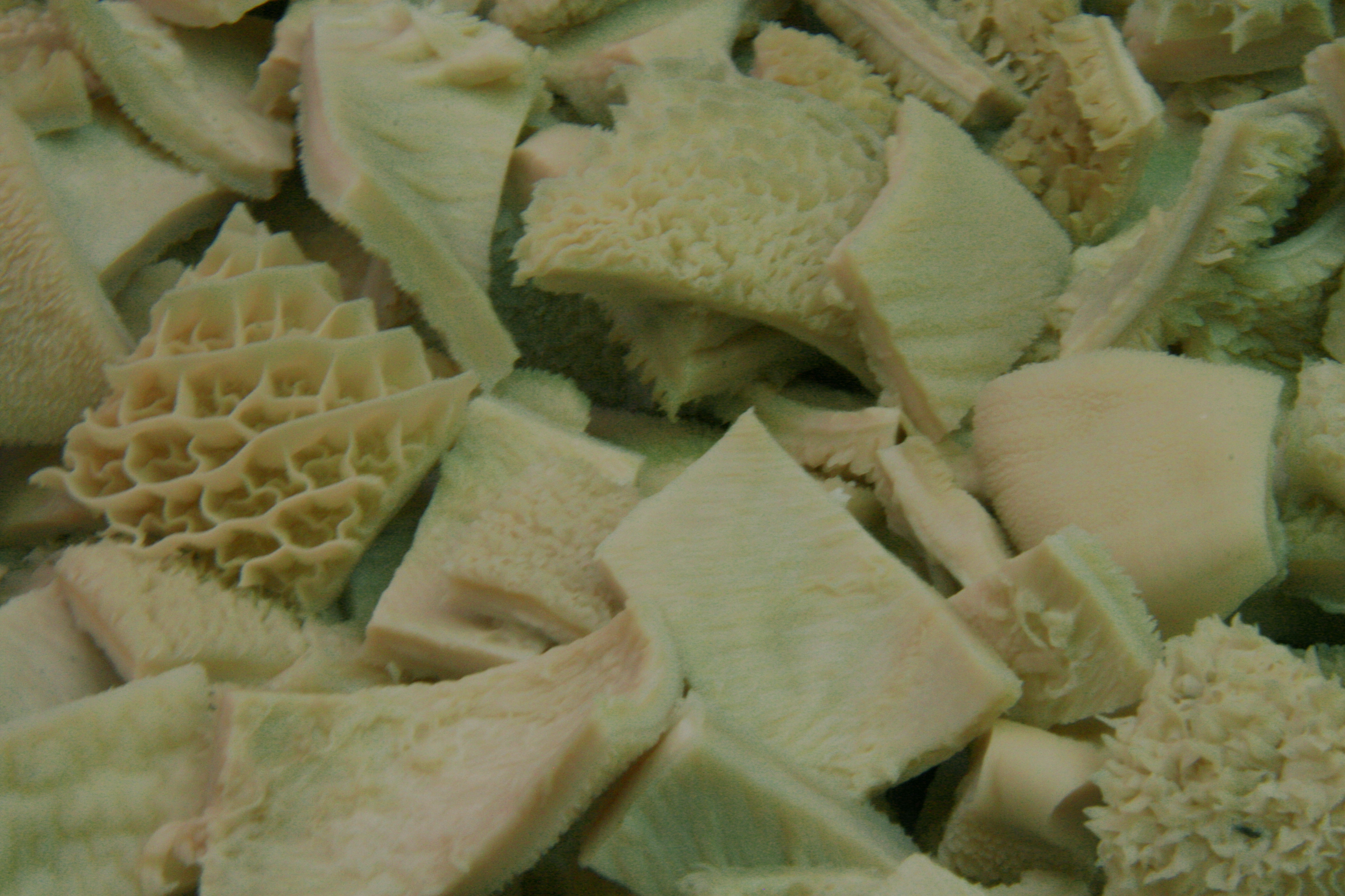 Callos de ternera